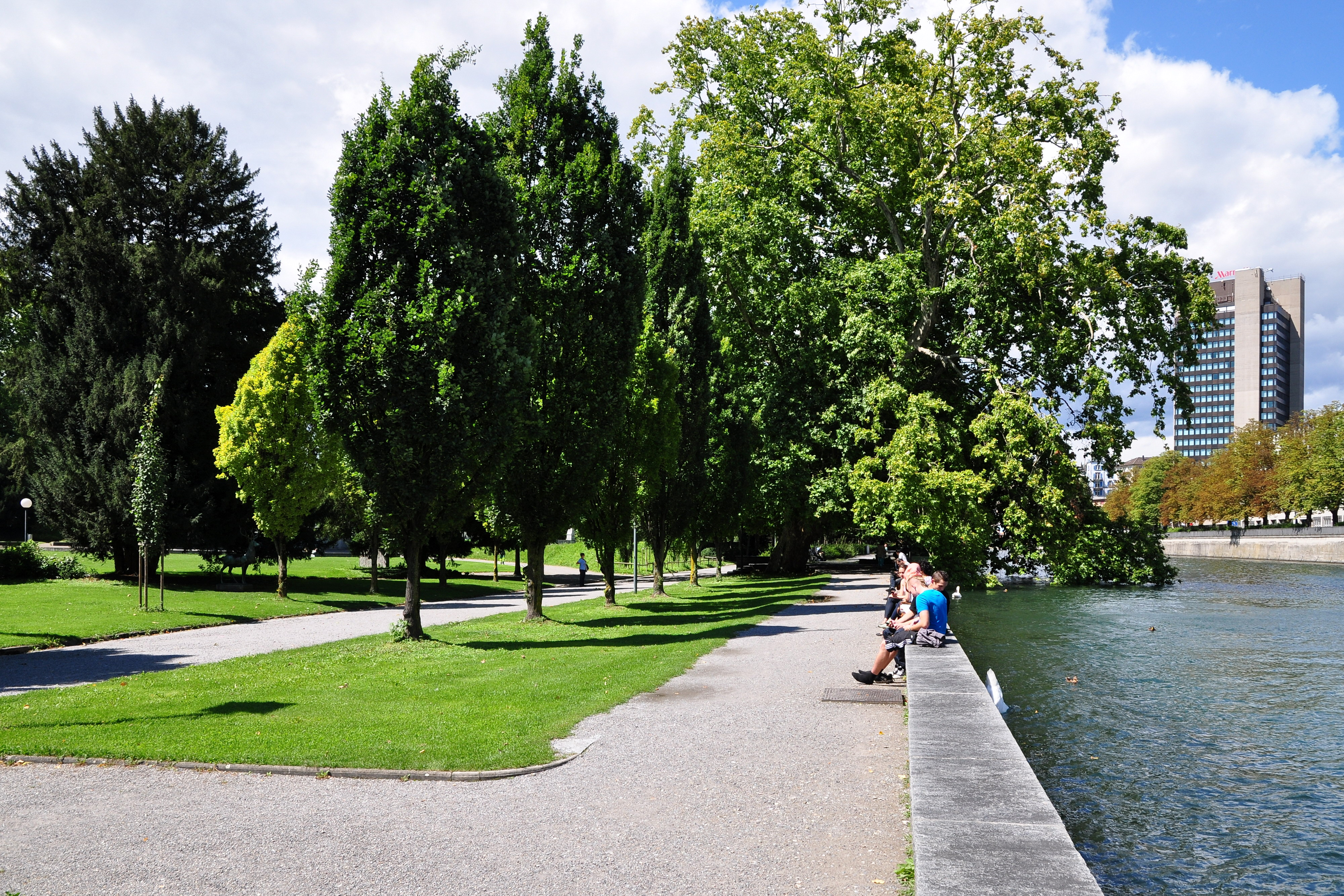 Platzspitzpark & Limmat in Zürich (Switzerland)